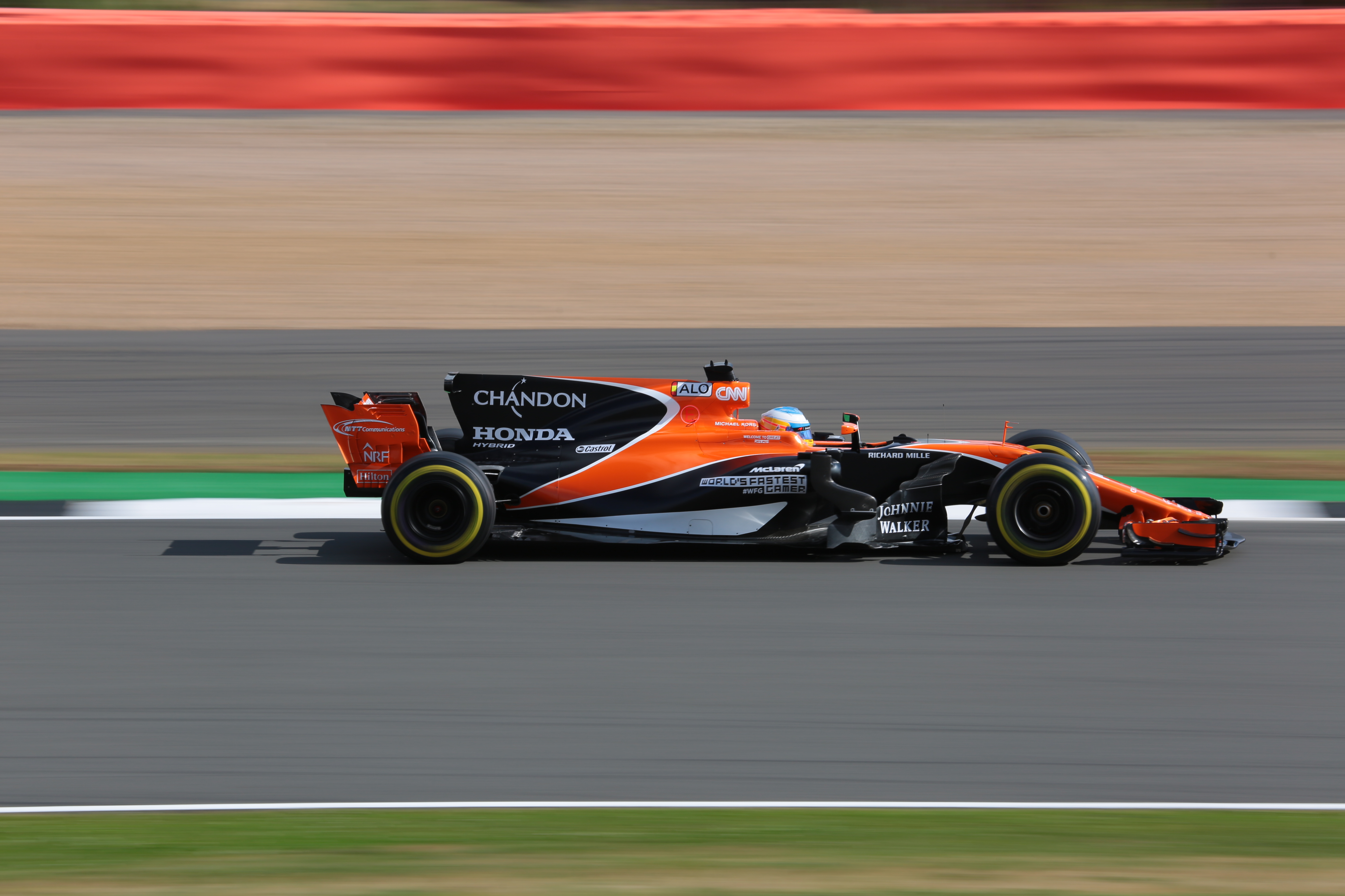 f1